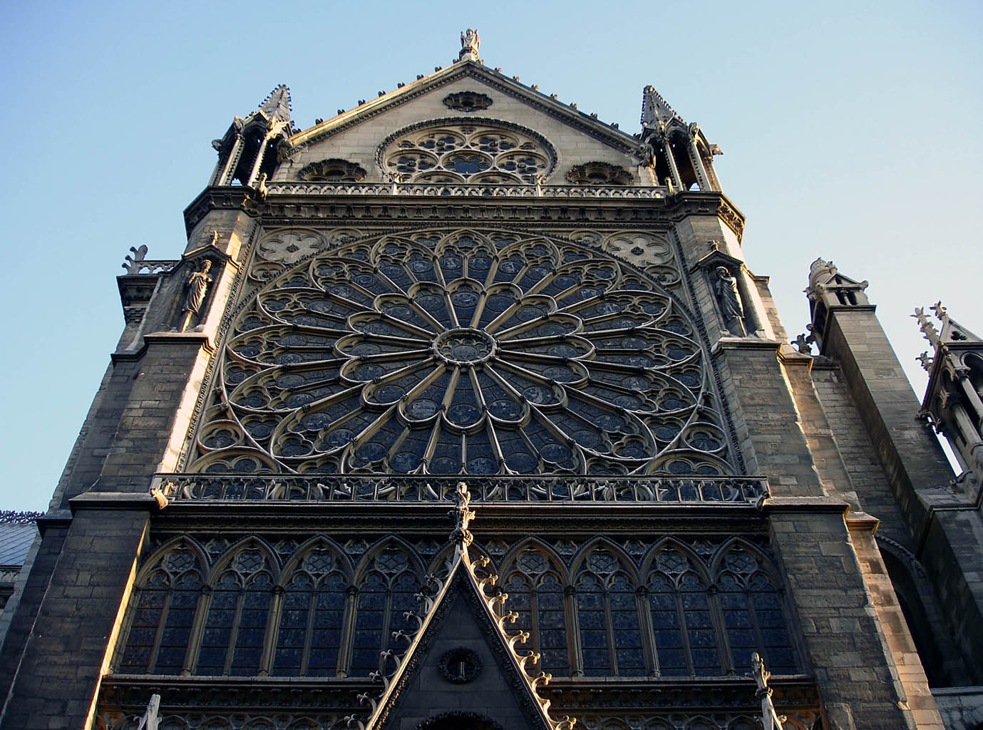 Cathédrale Notre-Dame de Paris (France). Rosace nord.